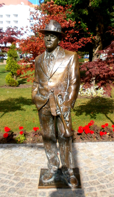 Pomnik Jana Machulskiego w Międzyzdrojach